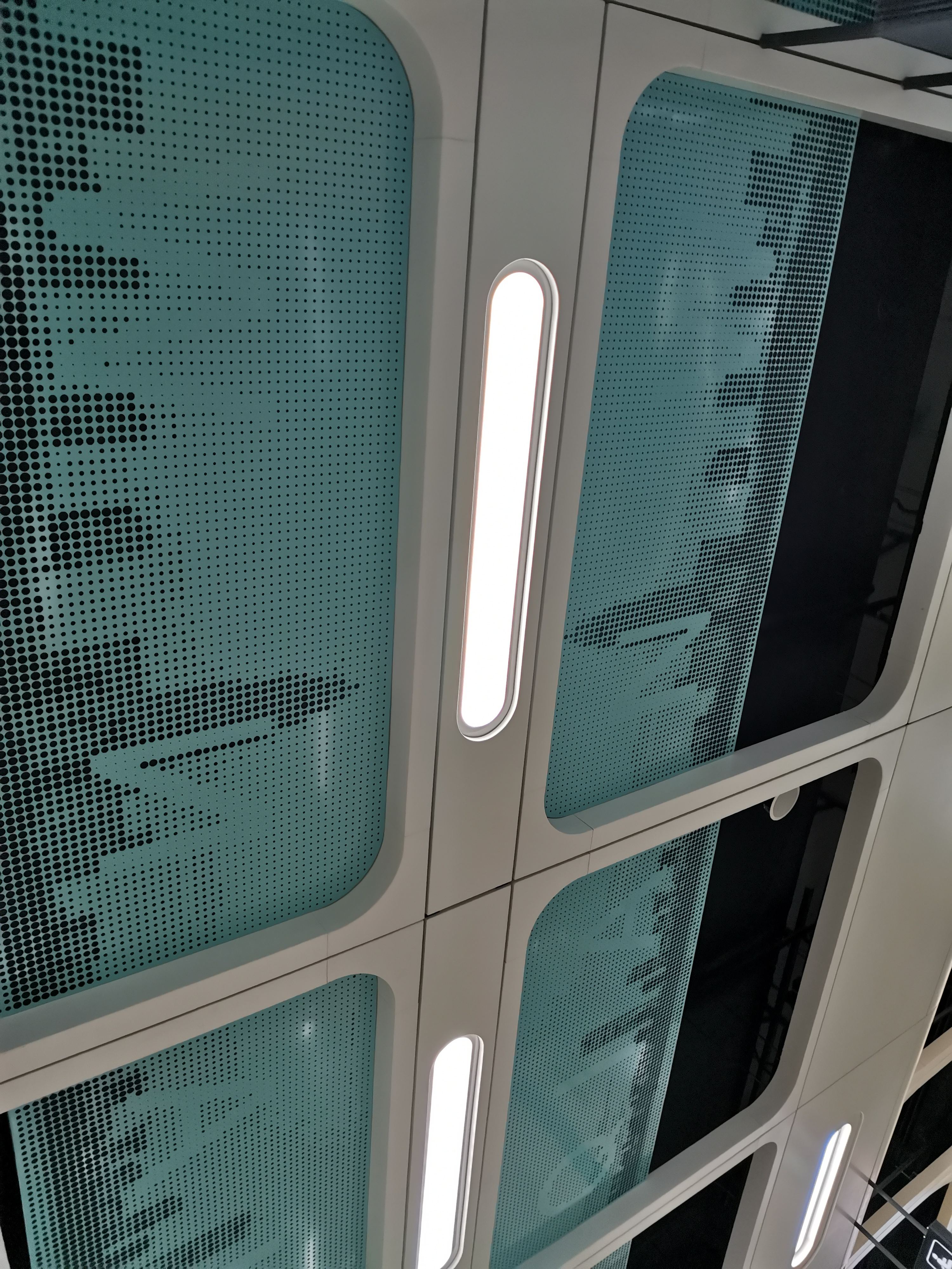 前灣站灯饰，以点阵化的深圳天际线为主要图案